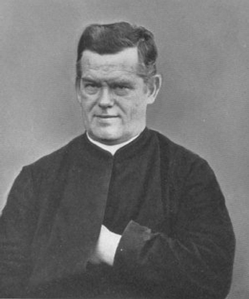 Franz Xaver Kugler (1862-1929) Jesuit und Mathematiker